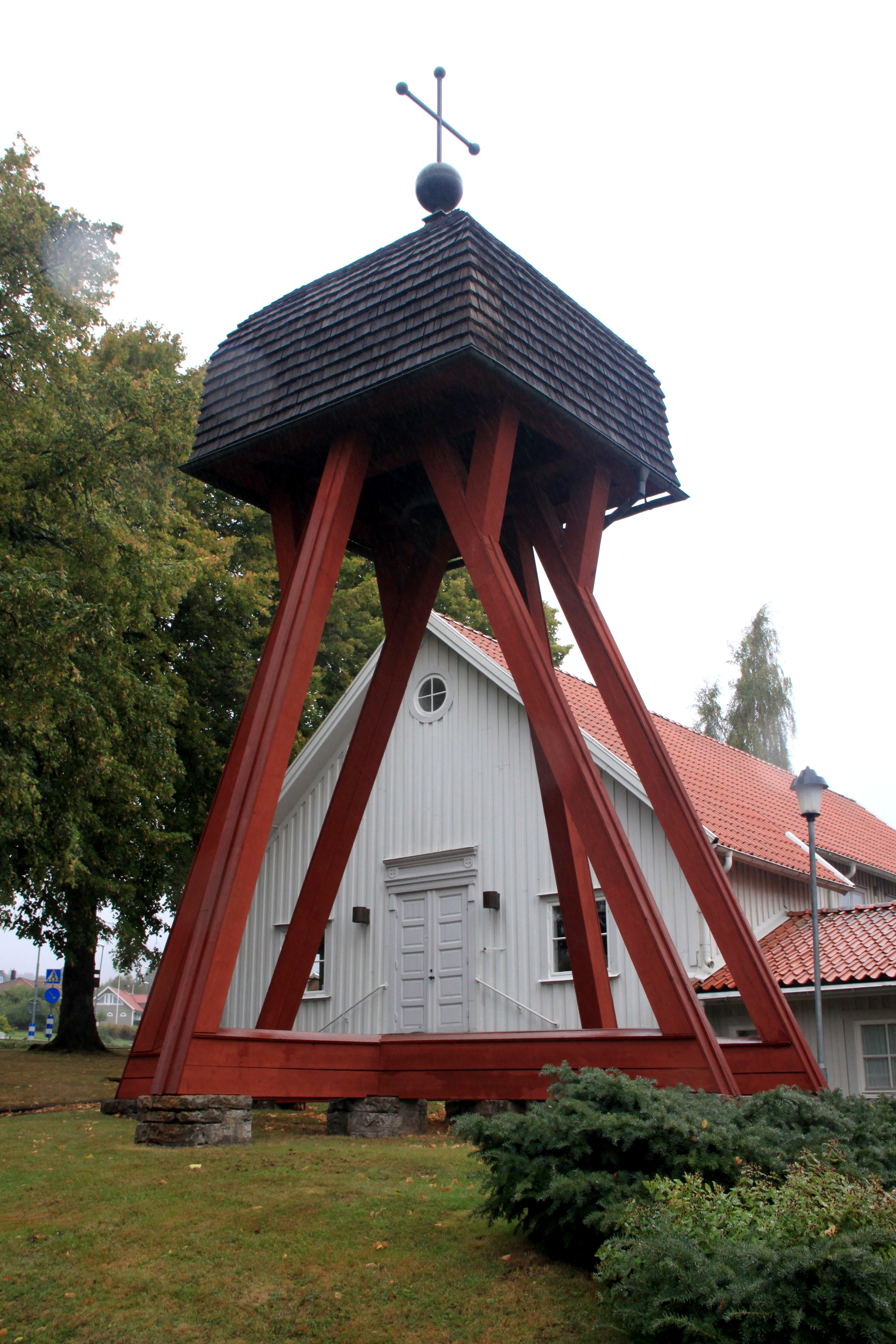 Däldernas kapell (Kapellet 1)